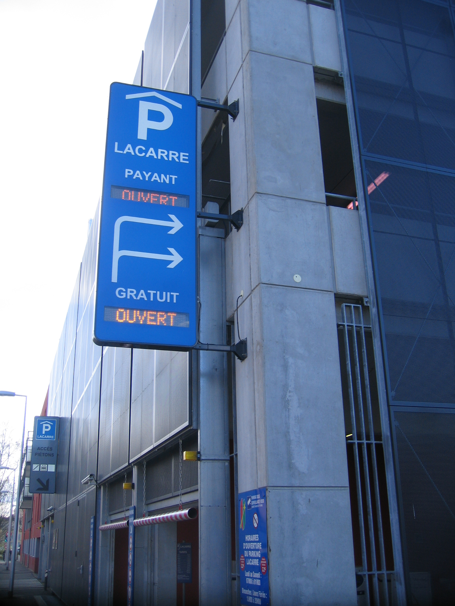 Le parking silo de la place Lacarre